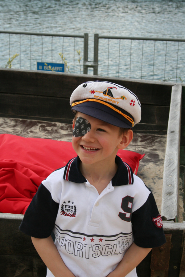 Pflaster